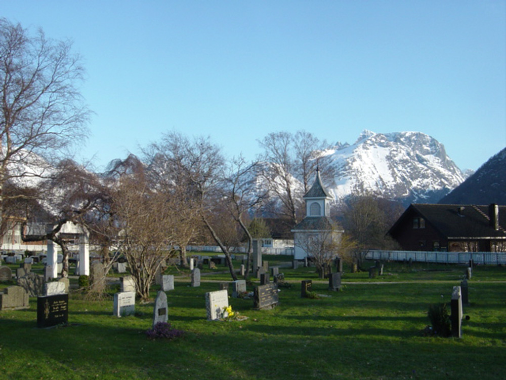 Åndalsnes gravlund